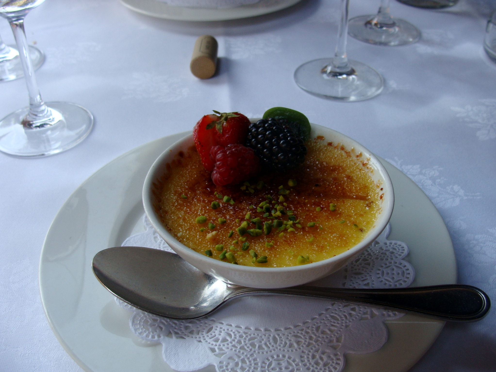 Crème brûlée